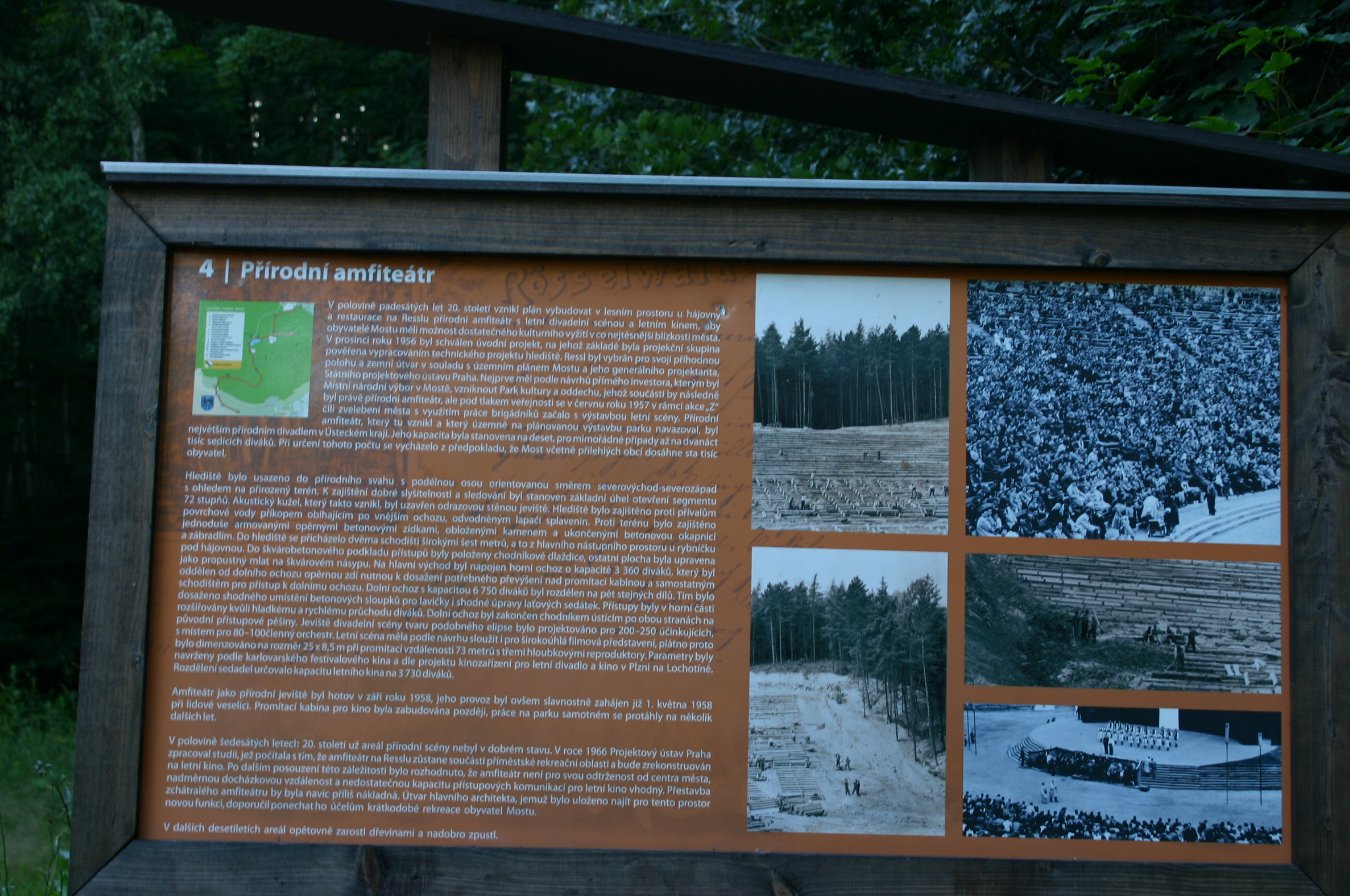 Amfitheater auf dem Rösselberg bei der Stadt Brüx (Most)